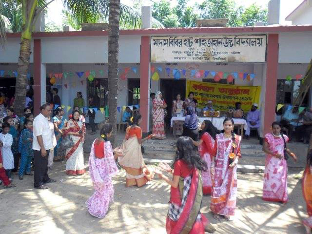 বর্ষবরণ উৎসব